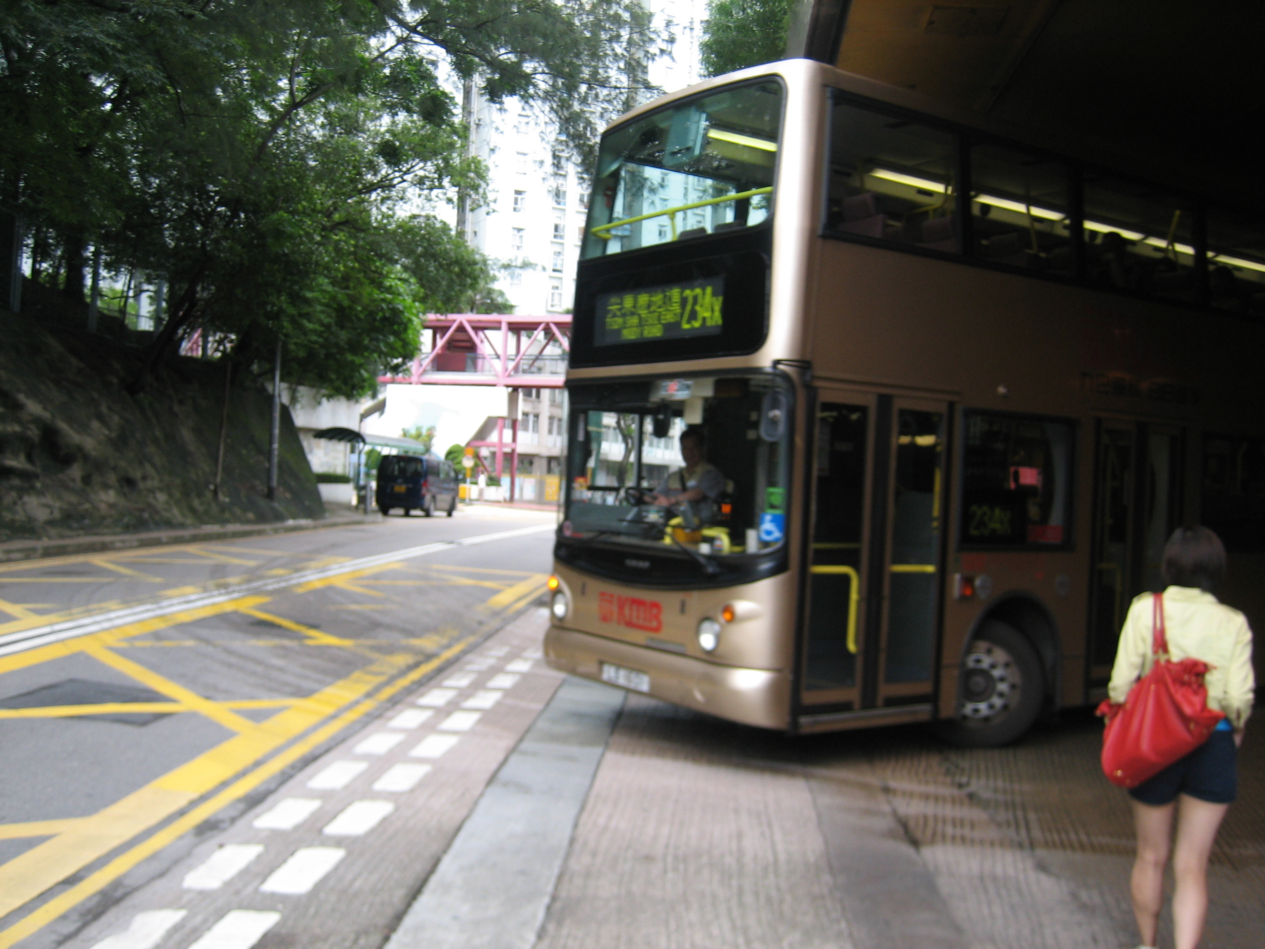 灣景花園巴士總站開出的234X巴士